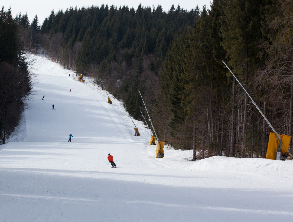 Вид одной из трасс горнолыжного курорта Буковель